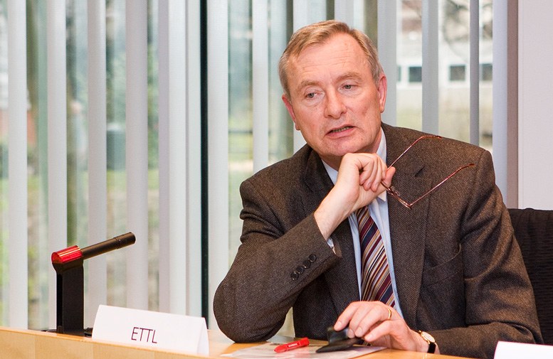 MdEP Harald Ettl